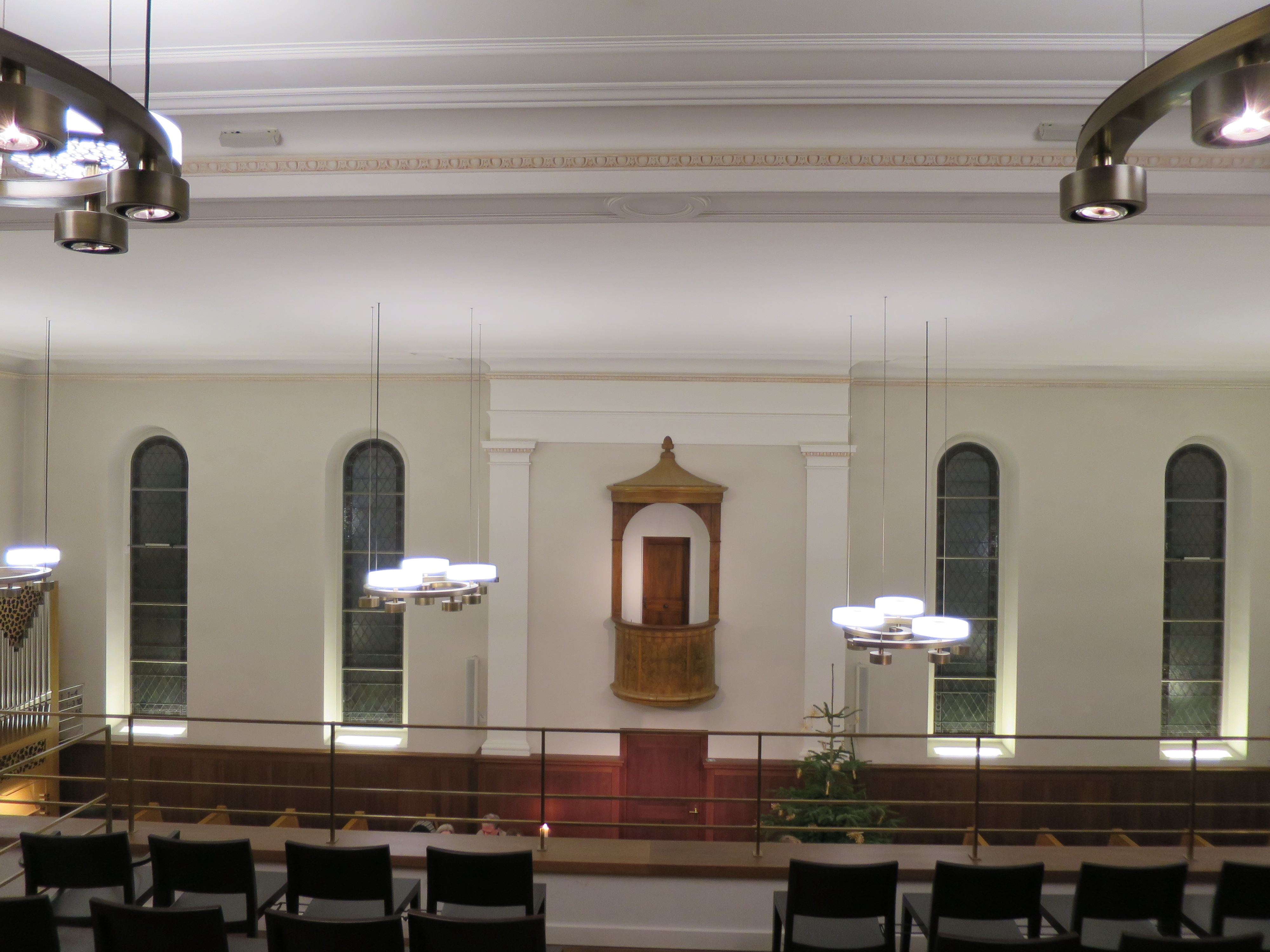 Innenraum von der Emore aus